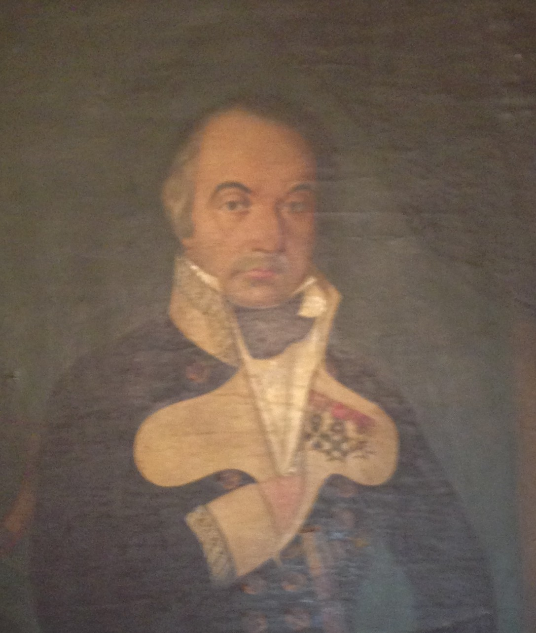 Juan Clarós y Presas, destacado patriota que acaudillo a los guerrilleros de Alto Ampurdán